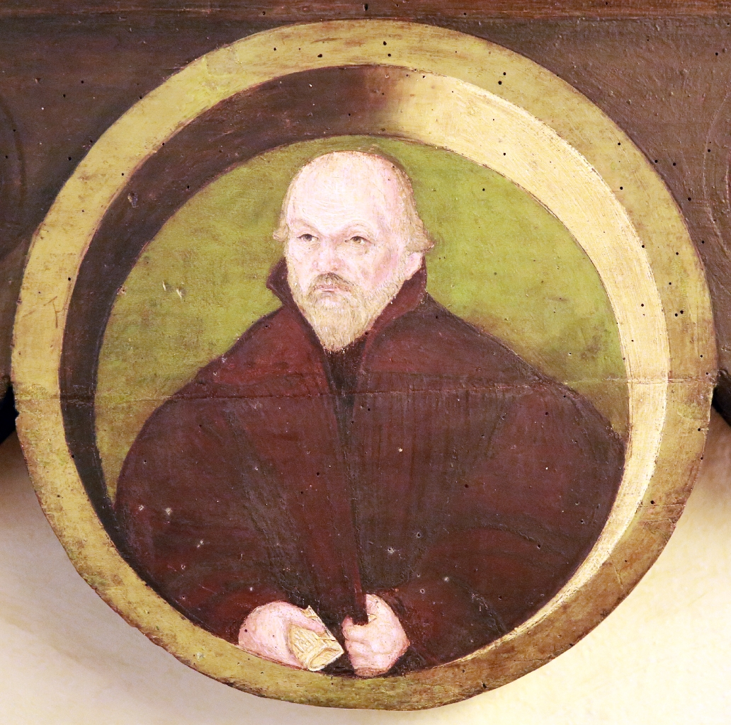 Pirna, Stadtkirche St. Marien: Bildnis von Anton Lauterbach (1502-1569), Theologe und Reformator, erster evangelischer Superintendent in Pirna, in seine Amtszeit fiel die Vollendung des Baus der Marienkirche.